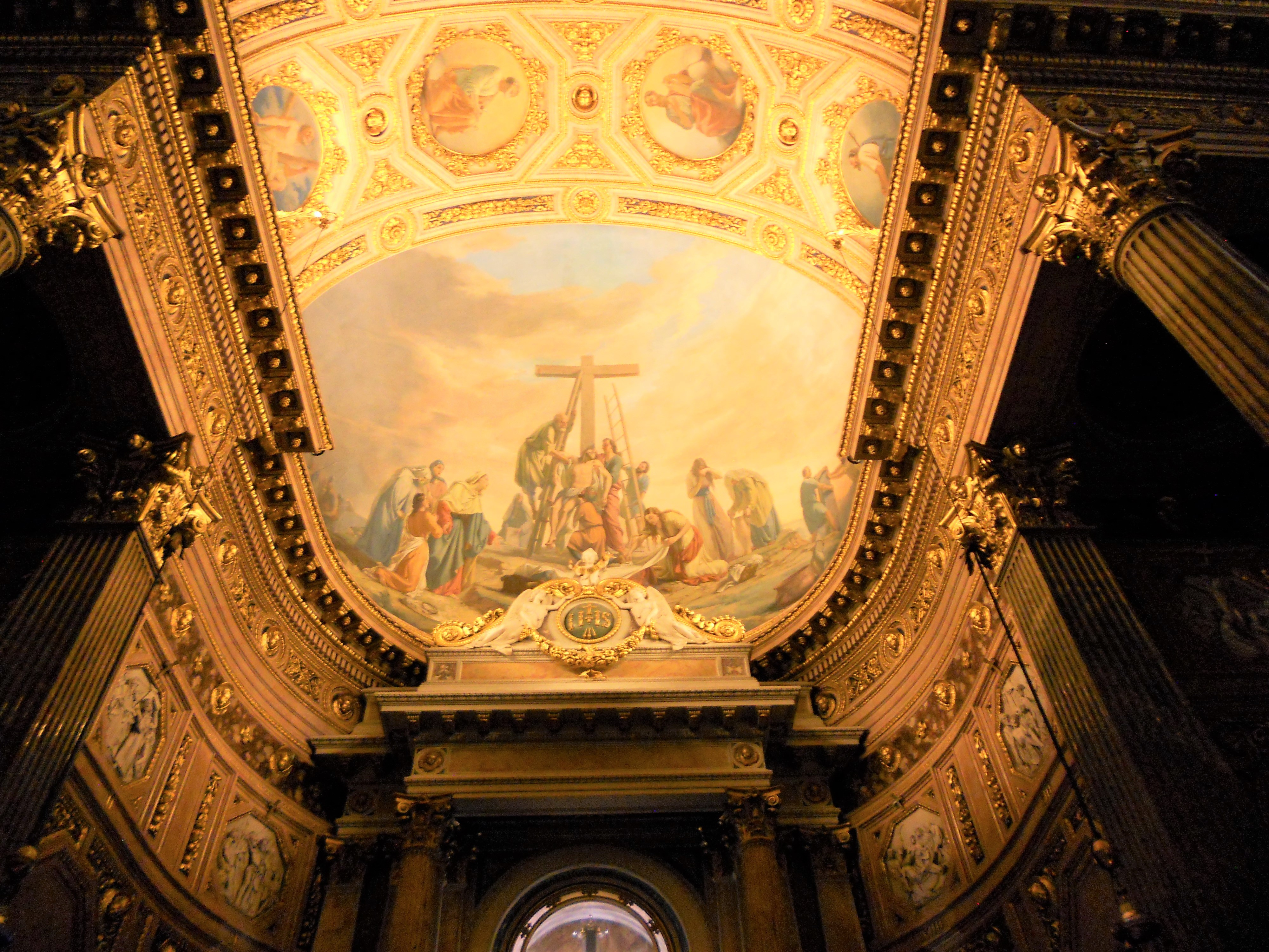 Volta della cappella dell'Eucarestia del duomo di Bergamo